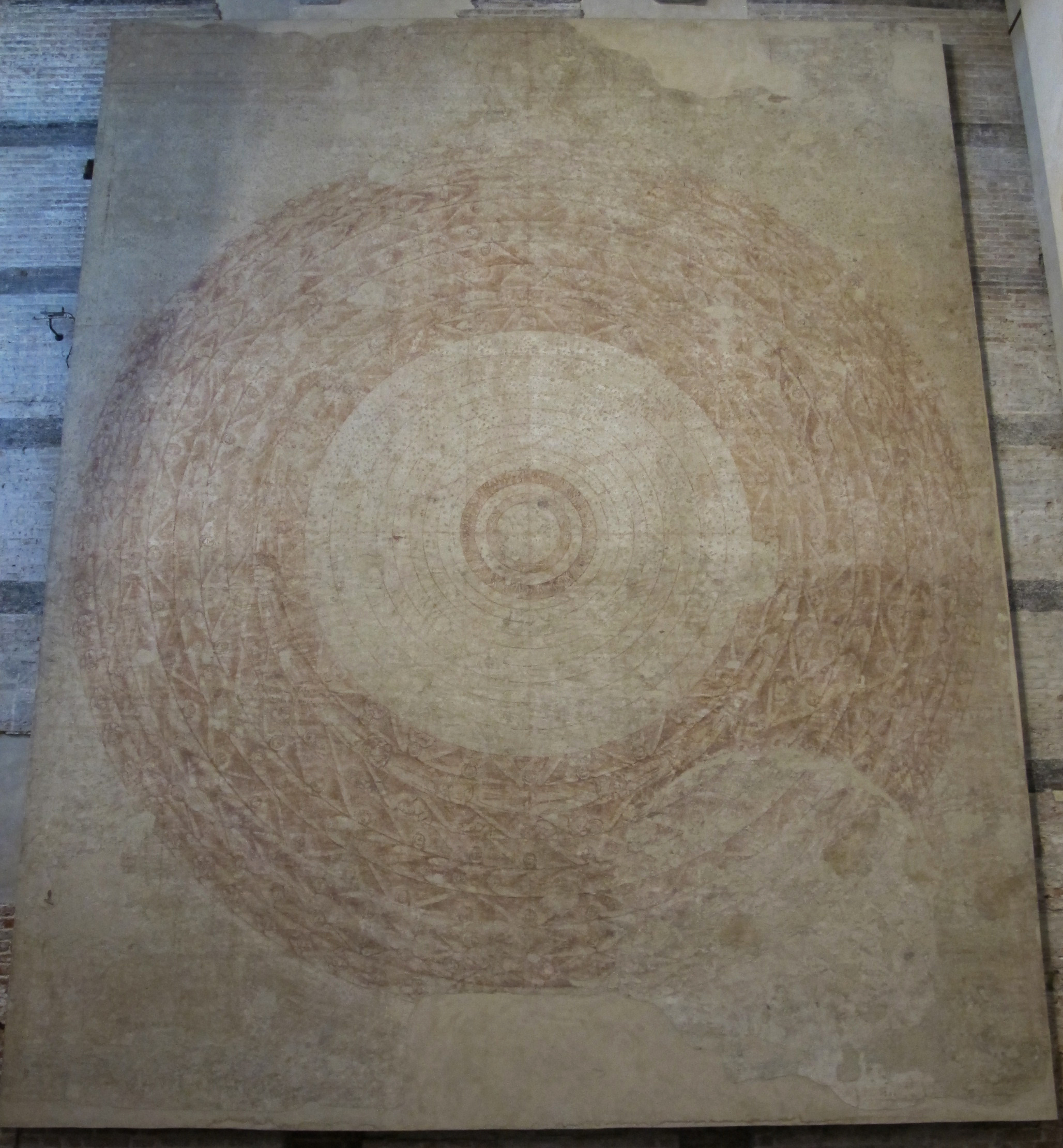 Piero di puccio, cosmografia teologica, 1389-1391